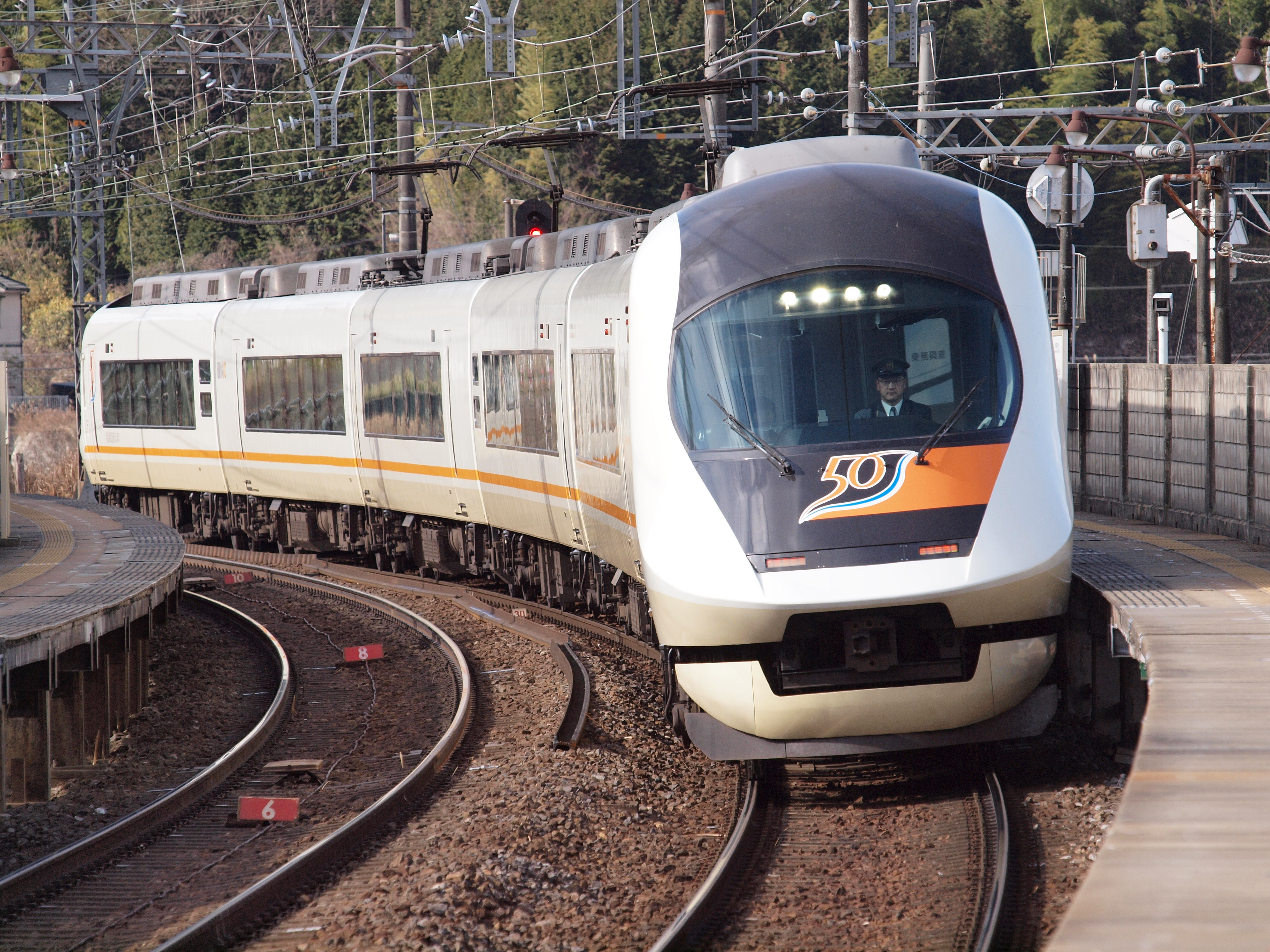 Kintetsu type 21020ja:近鉄21020系電車